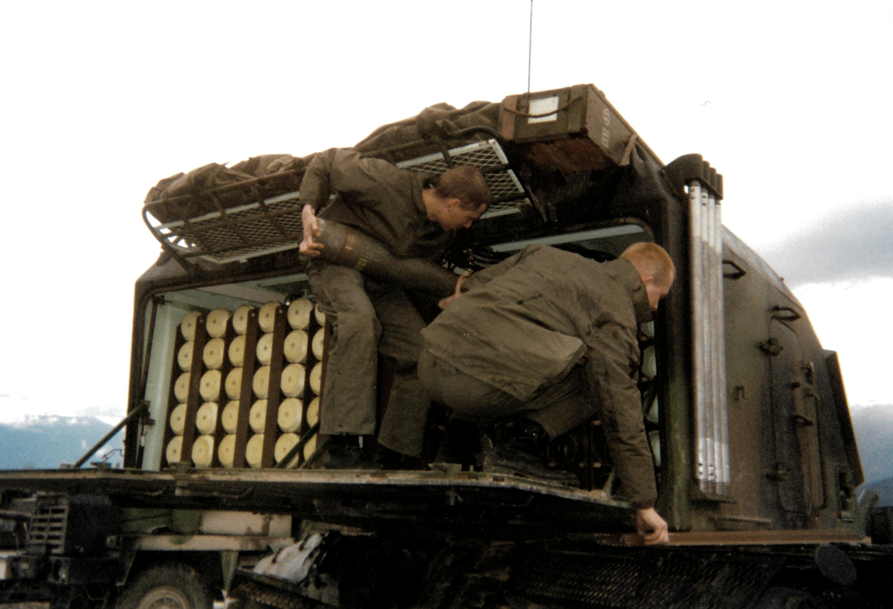 Le première classe Bouchet et moi même rangeons les obus. Chaque obus pèse 42 kg. on remarquera que les charges qui propulsent les obus sont rangées de l'autre coté du char, coté artificier.